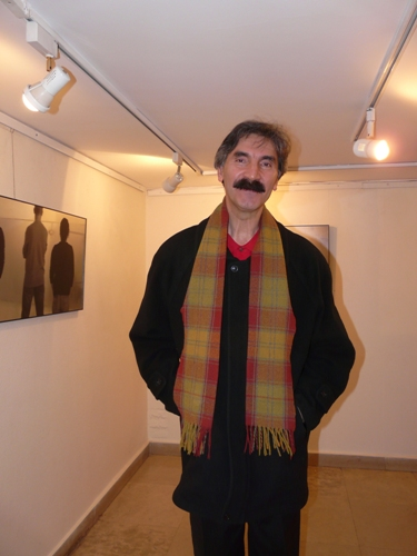 نوایی، نوایی...